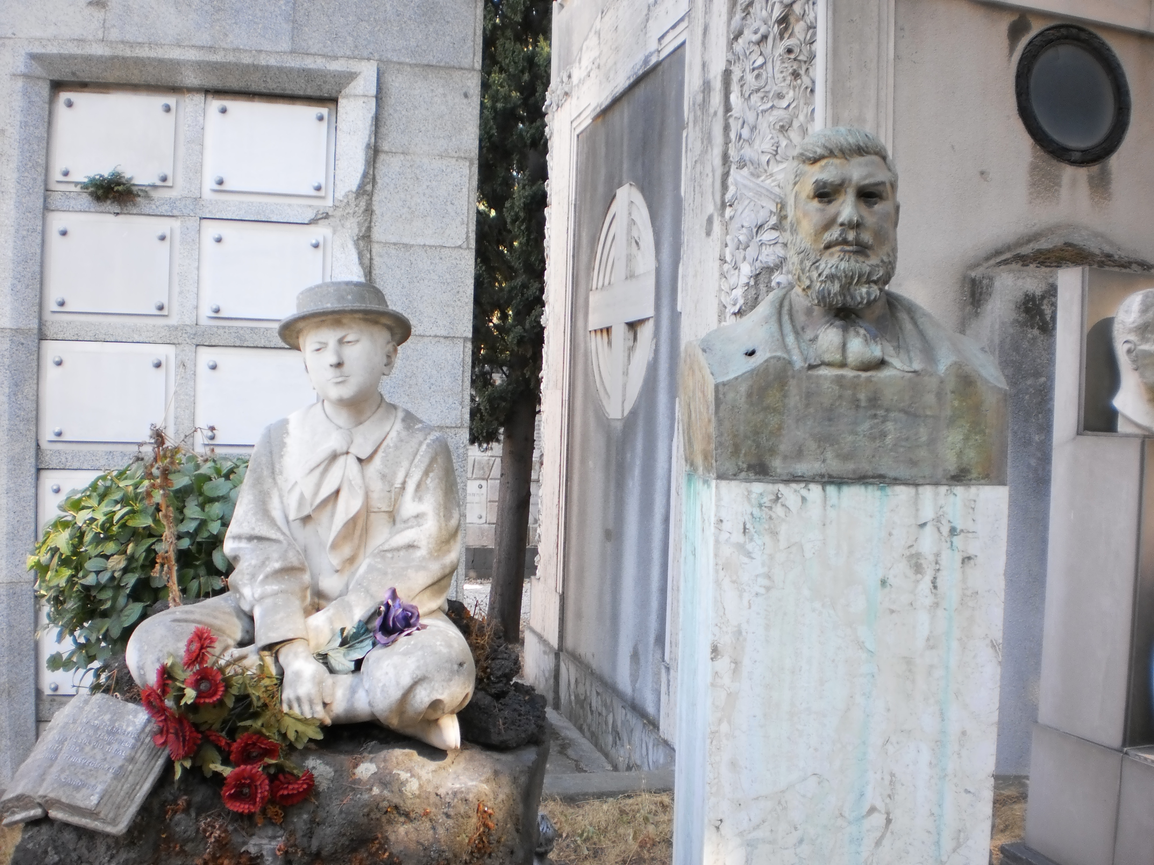 Francesco e Ciccinuzzo Lo Sardo.